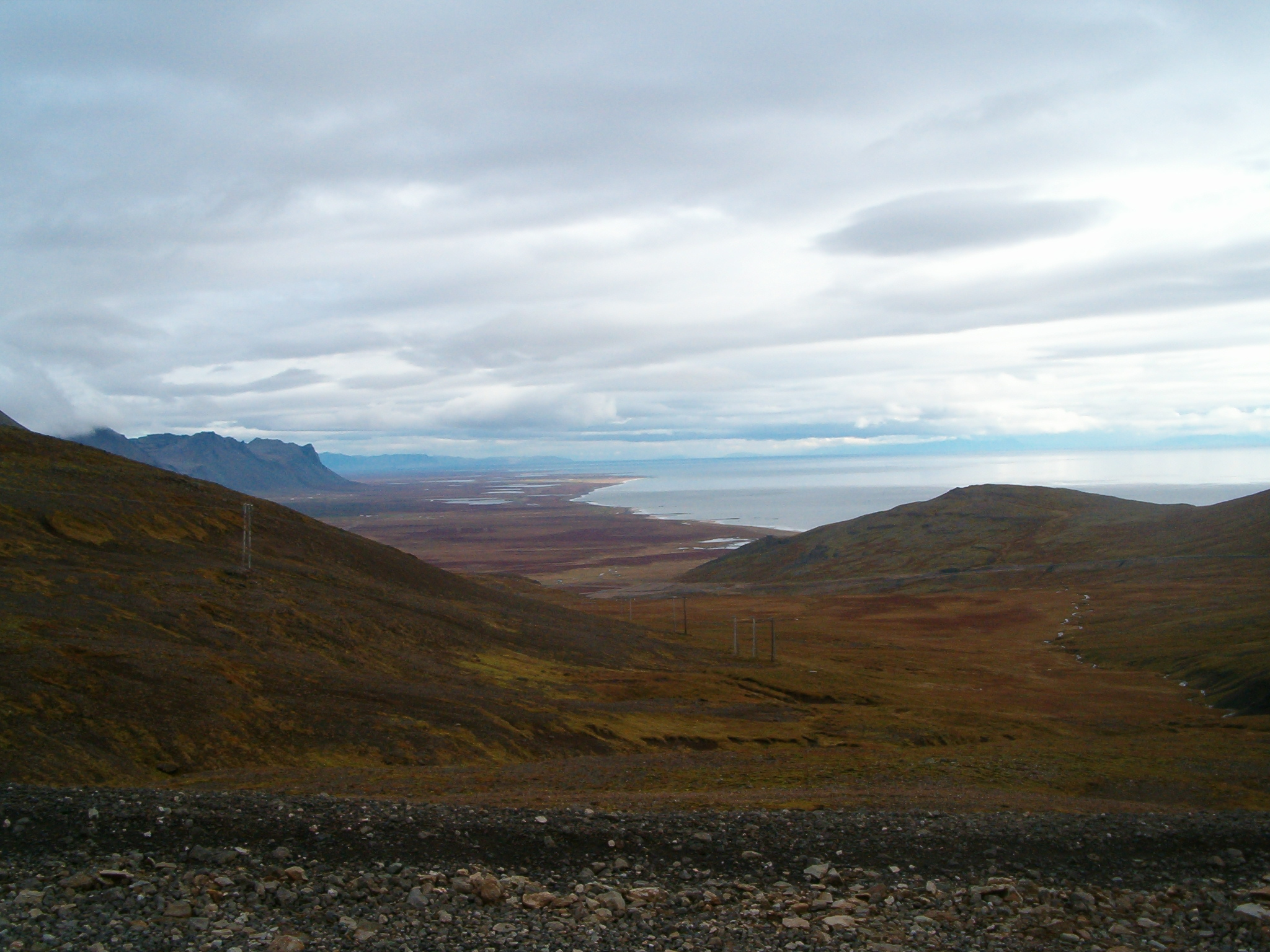 Overzicht over de zuidkust van Snæfellsnes. Eigen werk. GFDL.